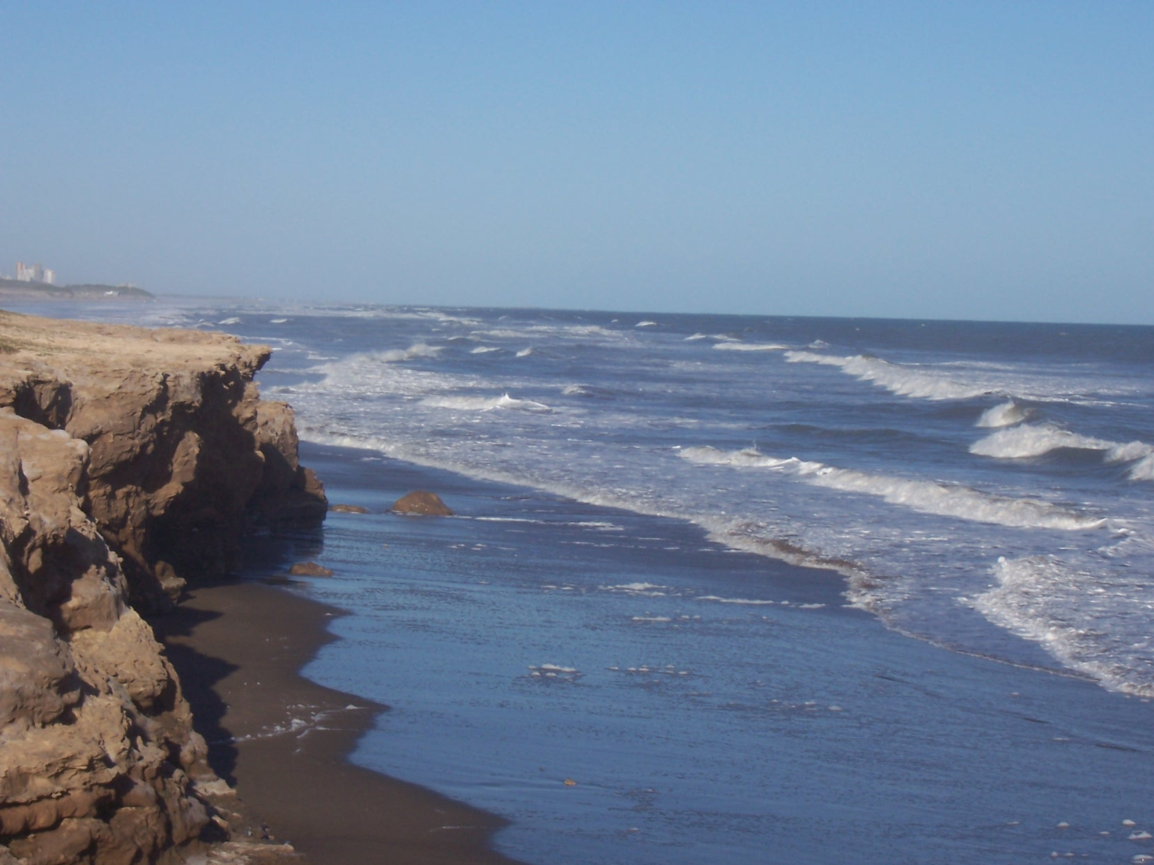 Las grutas, a pocos kilómetros de la ciudad de Necochea, Argentina.